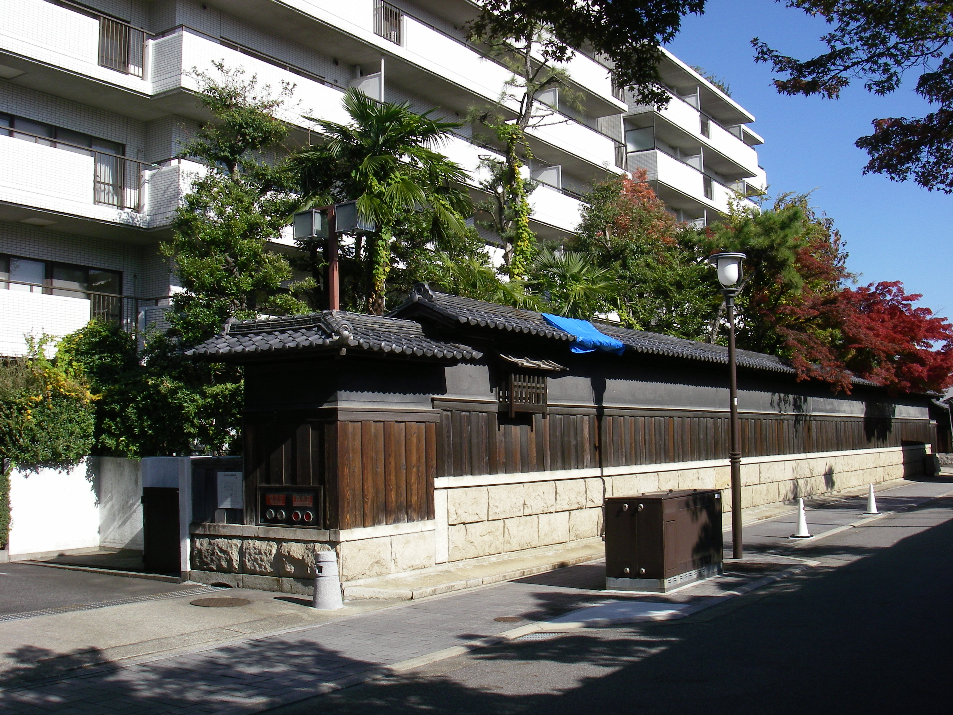 旧豊田家門・塀（名古屋市東区白壁四丁目） 敷地にはマンションが建てられたが門・塀はそのまま残されている。 門・塀は名古屋市の都市景観重要建築物等に指定。